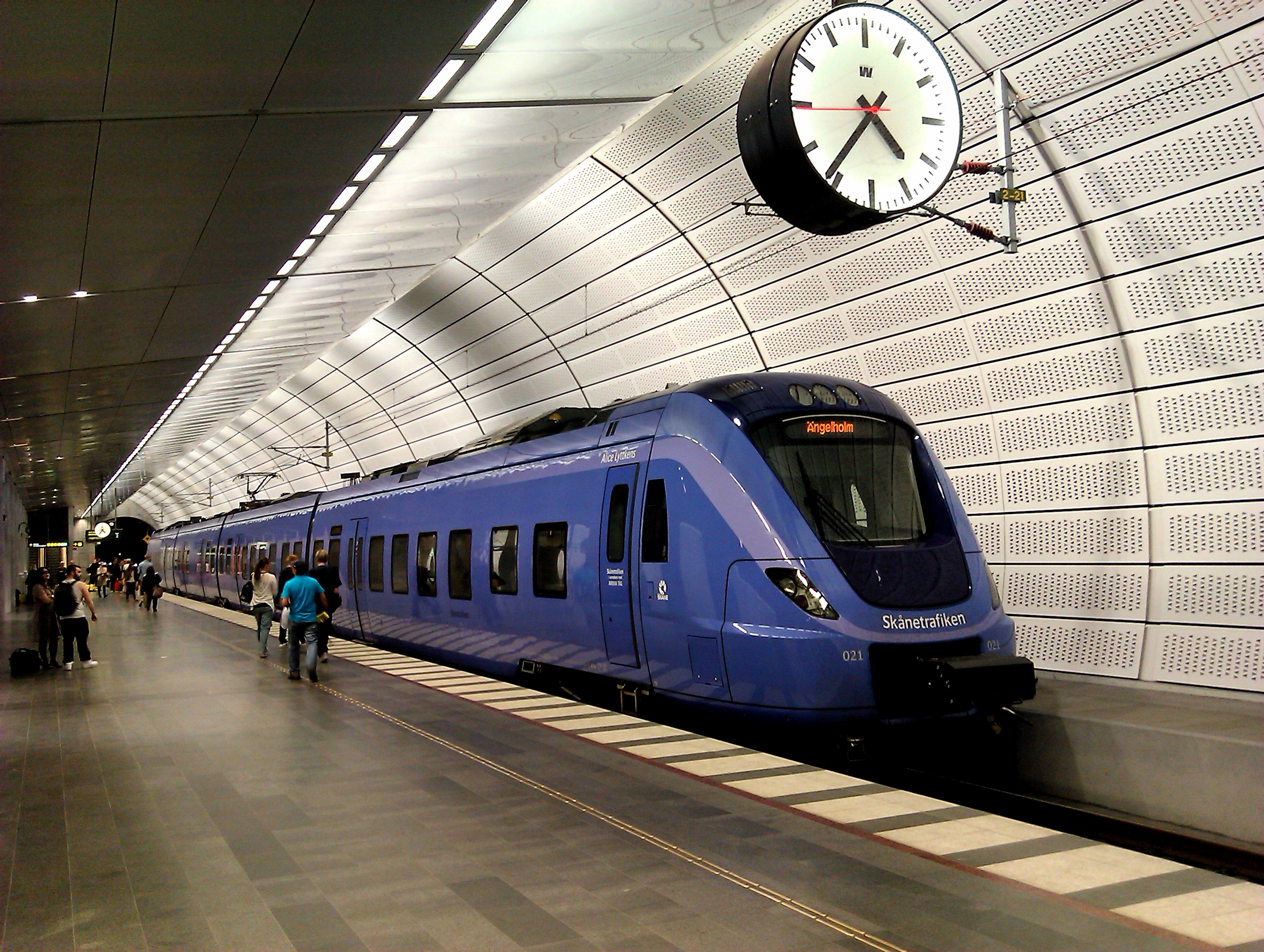 Pågatåg mot Ängelholm i Station Triangeln i Malmö.